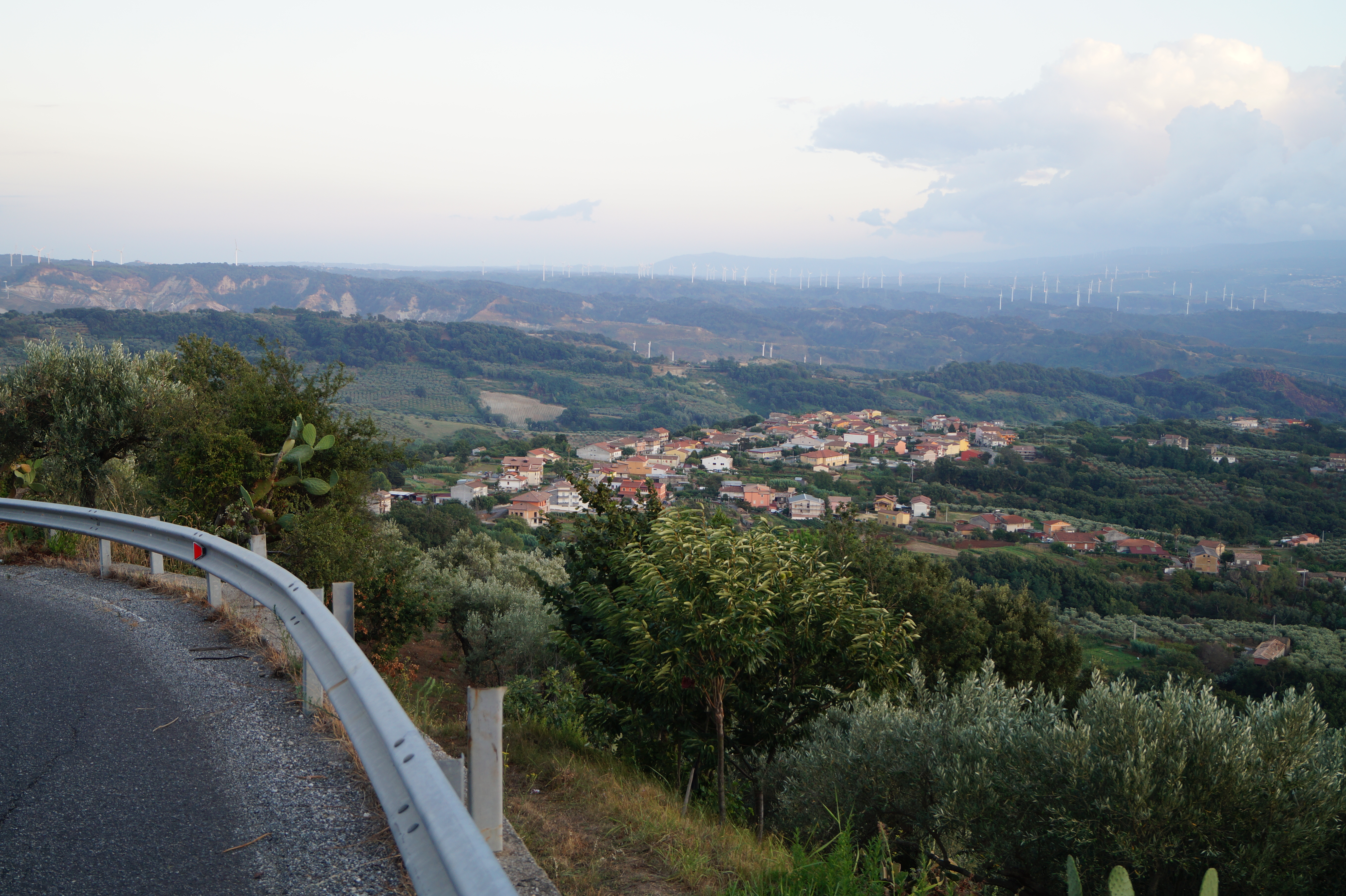 Cancello CZ